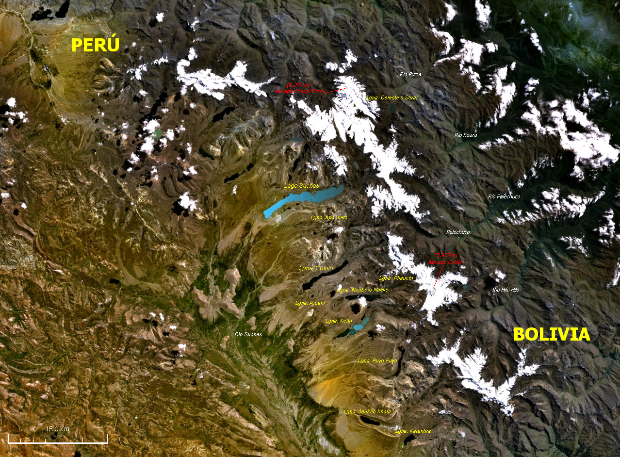 Imagen satelital de la cordillera de Apolobamba ubicada entre Bolivia y Perú.